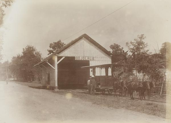 Remise voor paardentrams van de Solosche Tram Maatschappij te Bojolali op Midden-Java